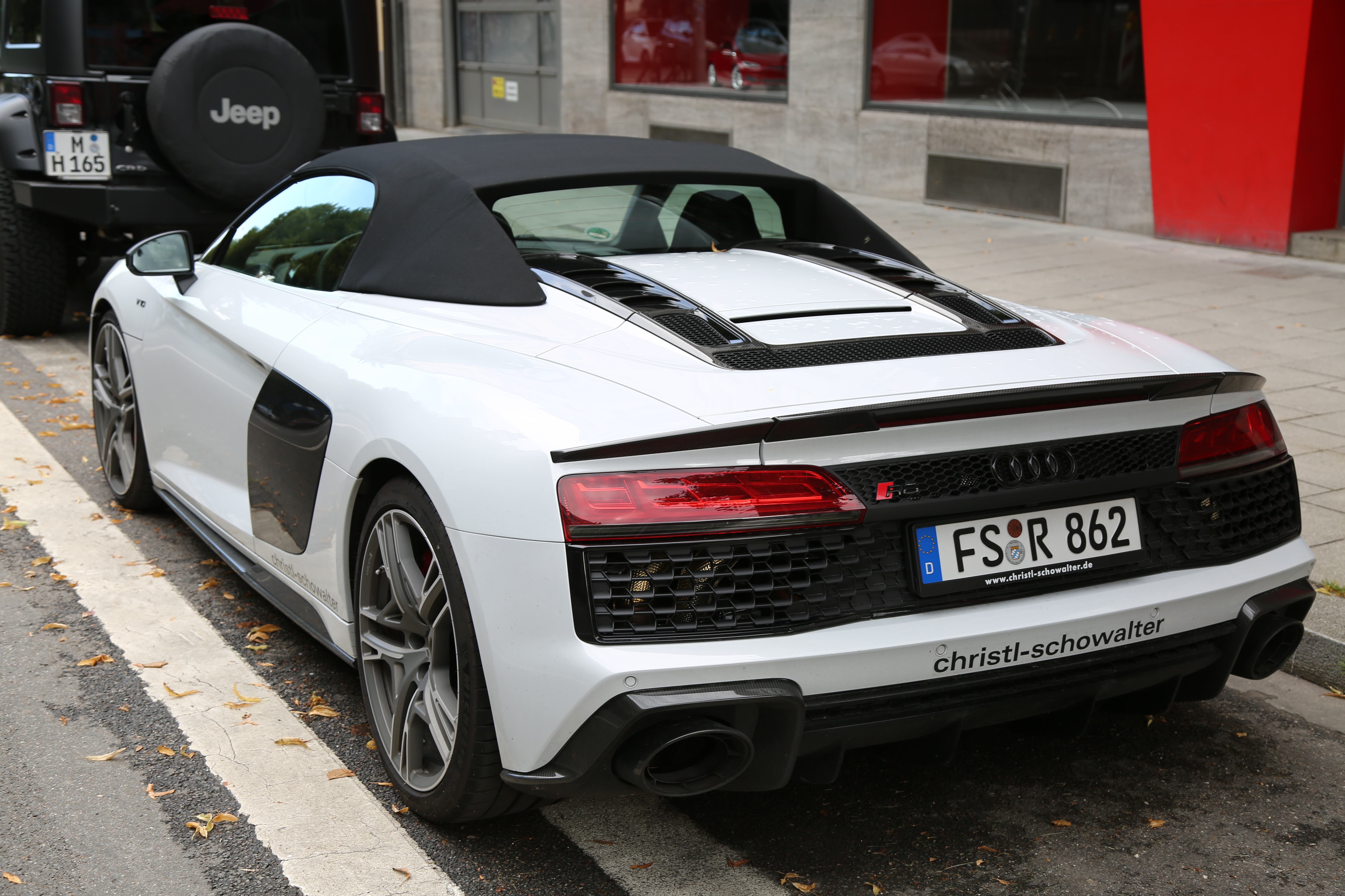 Audi R8 V10 Spyder Facelift von 2019